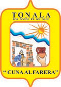 Escudo de armas de Tonalá